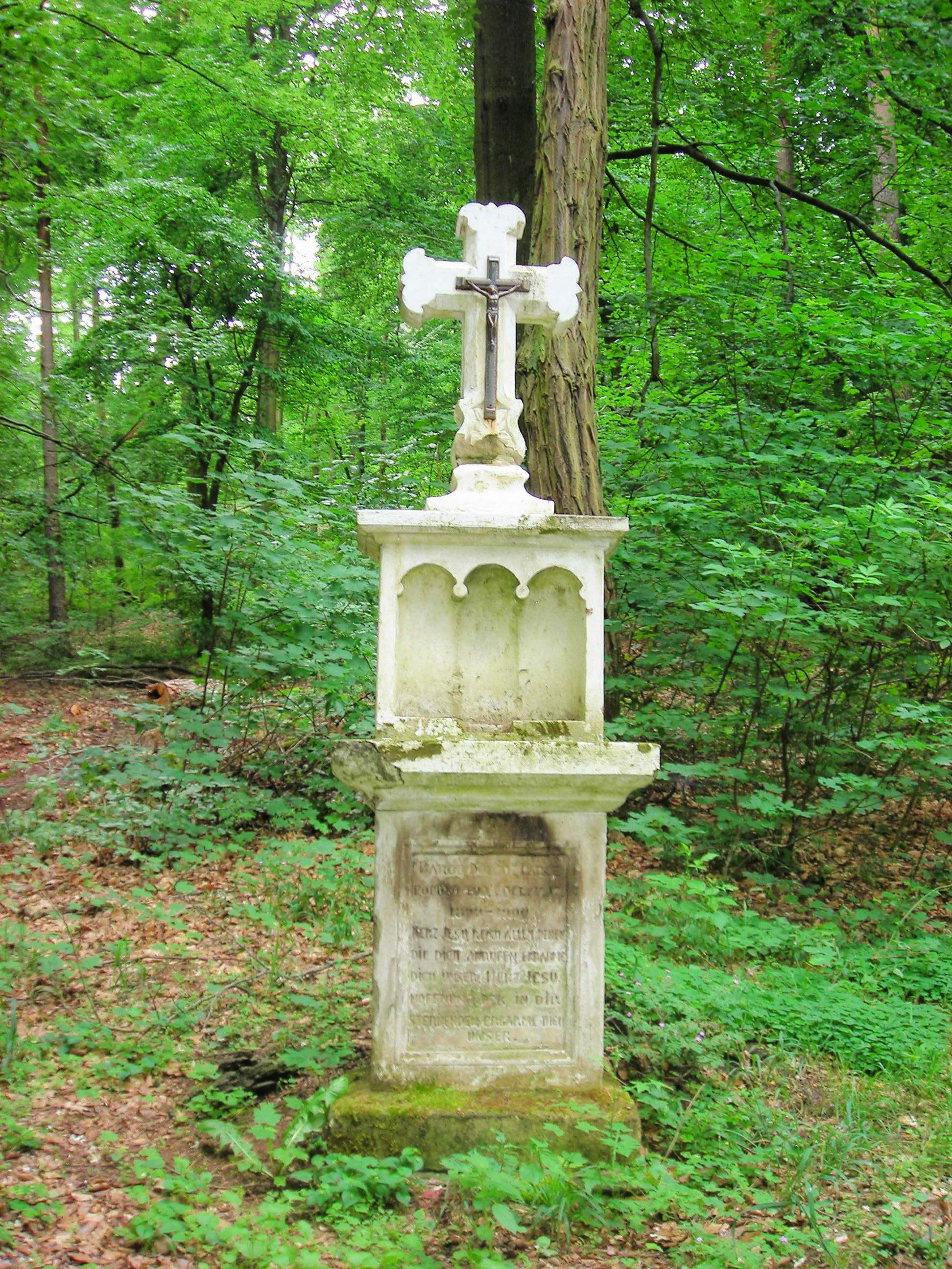 Croix de chemin à Guerting, sur le chemin vers Varsberg (Lorraine, France)